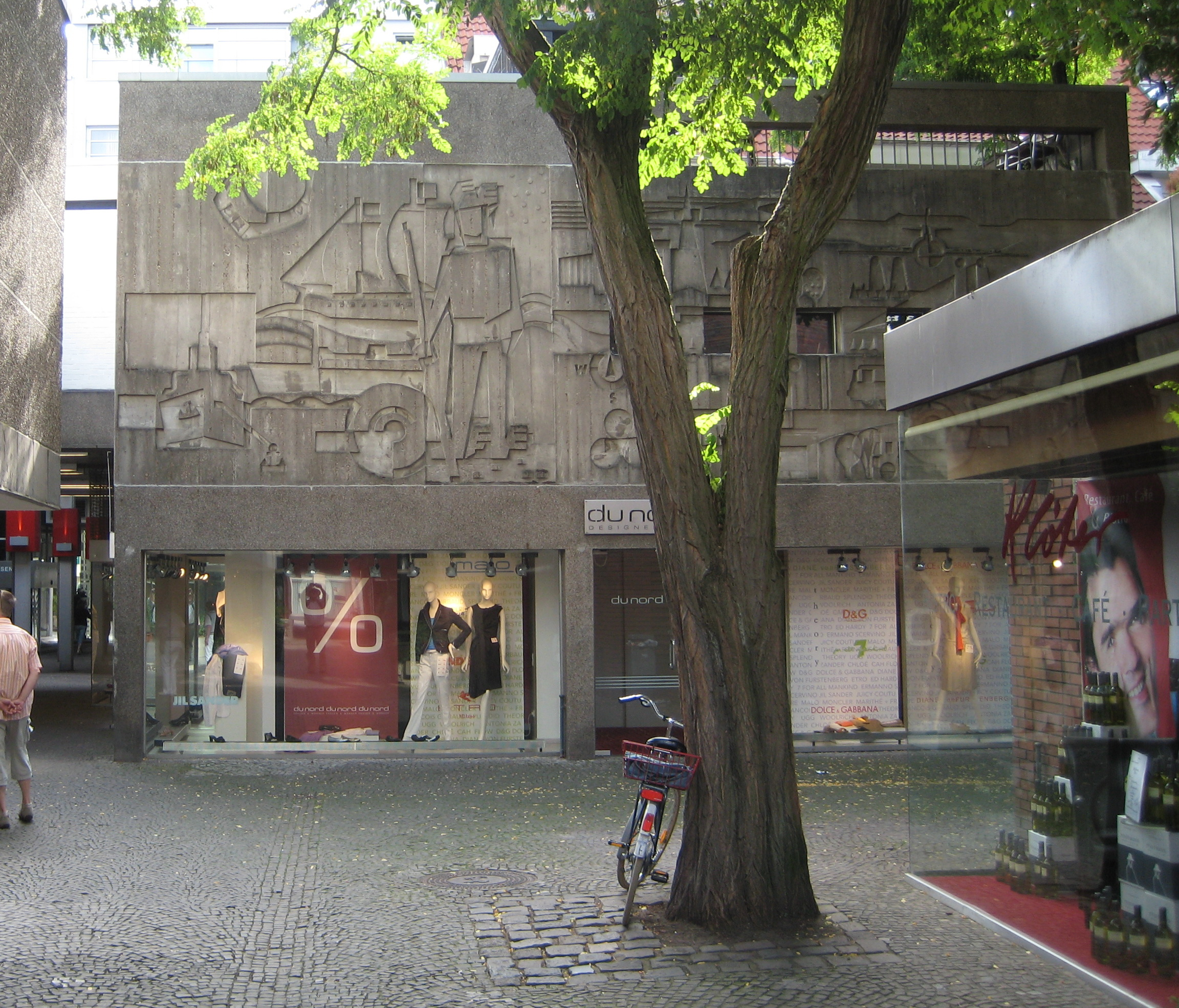 Georg Schmidt-Westerstede: Relief aus Beton "Merkur / Alter und neuer Handel" (3,40 x 11,05 m). Oldenburg (Oldenburg), Herbartgang. Wv-Nr. 2200, 1965.